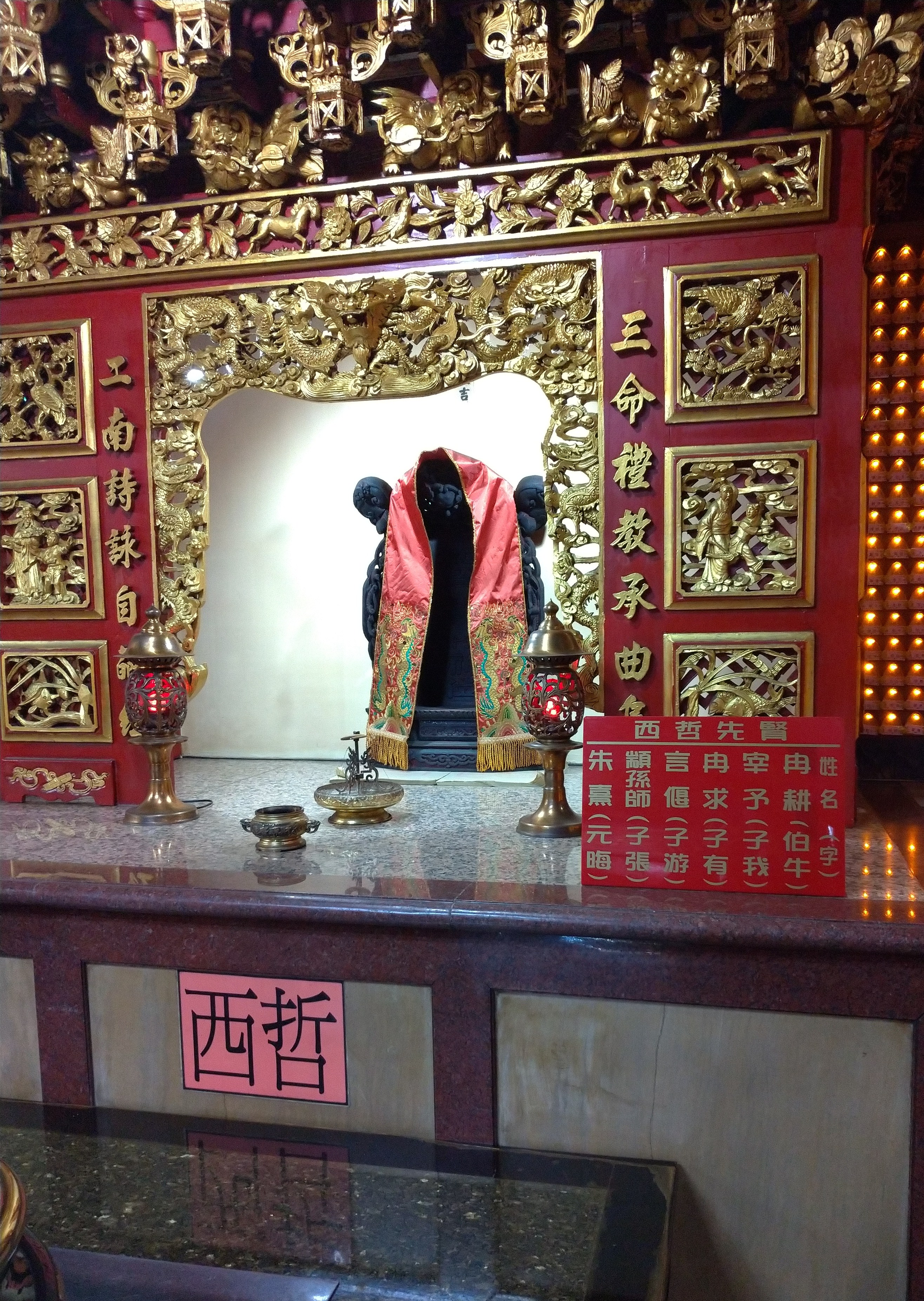 中文（台灣）: 大成殿西哲 大成殿至聖先師，案桌上投滿考生們的准考證影本，希望諸位神聖庇祐金榜題名。